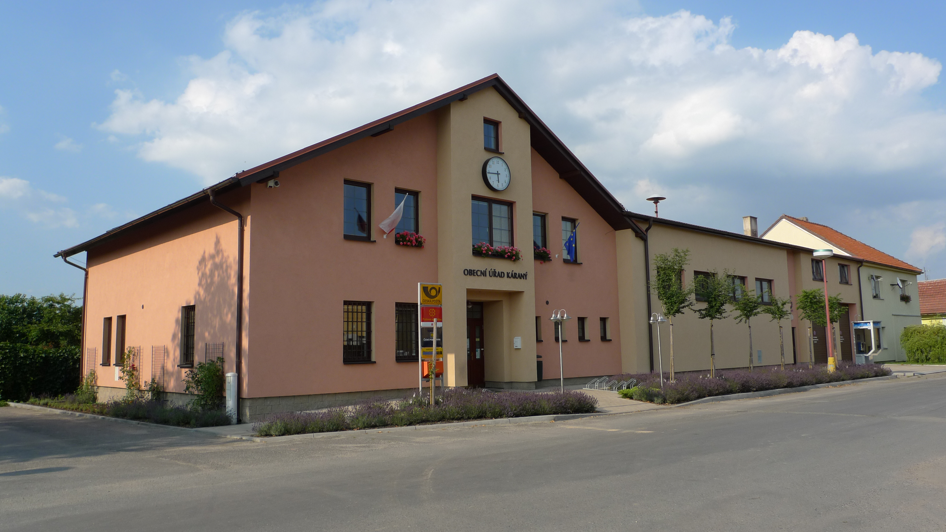 Obecni urad v obci Karany.